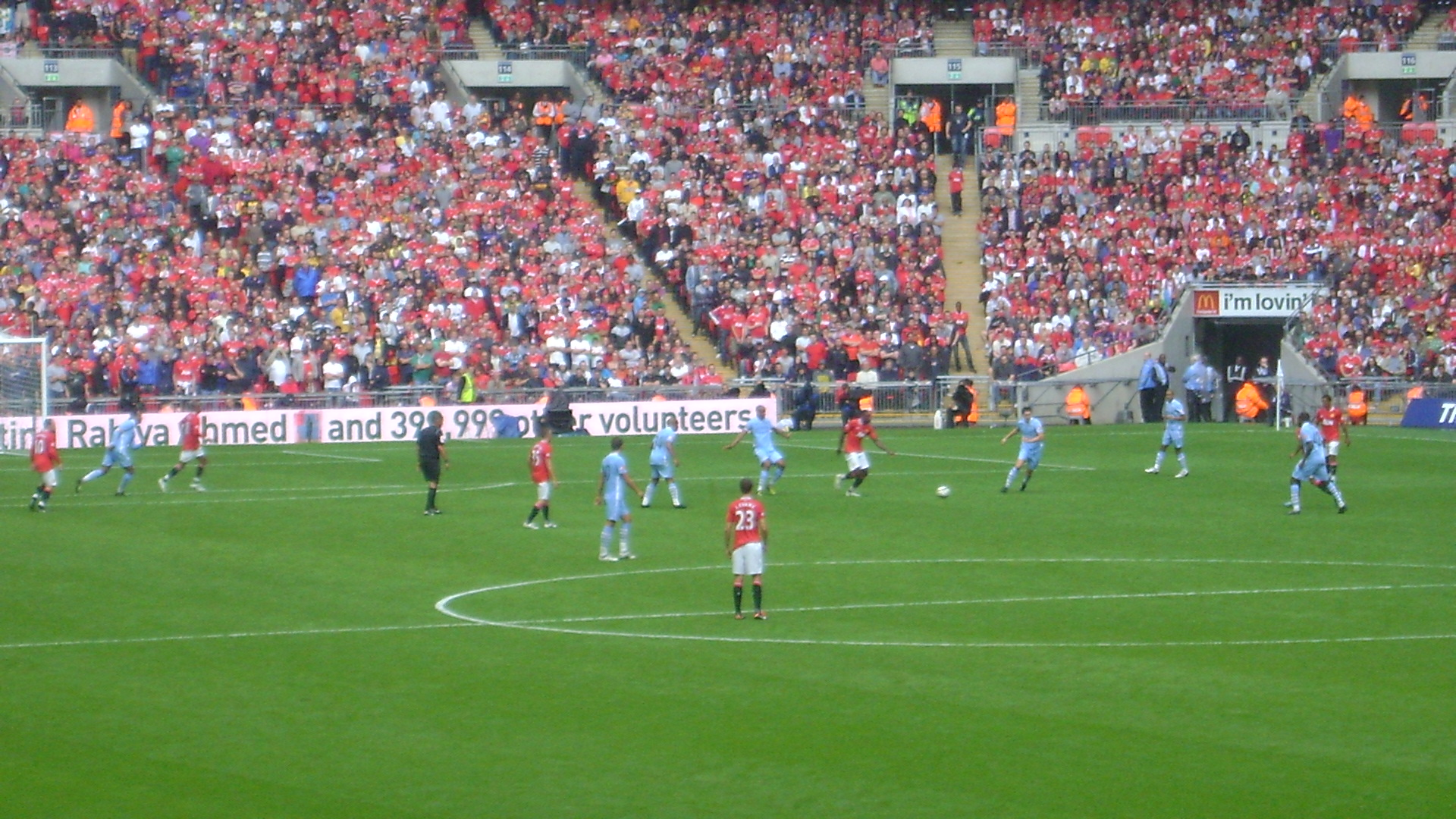 Manchester derby 2011